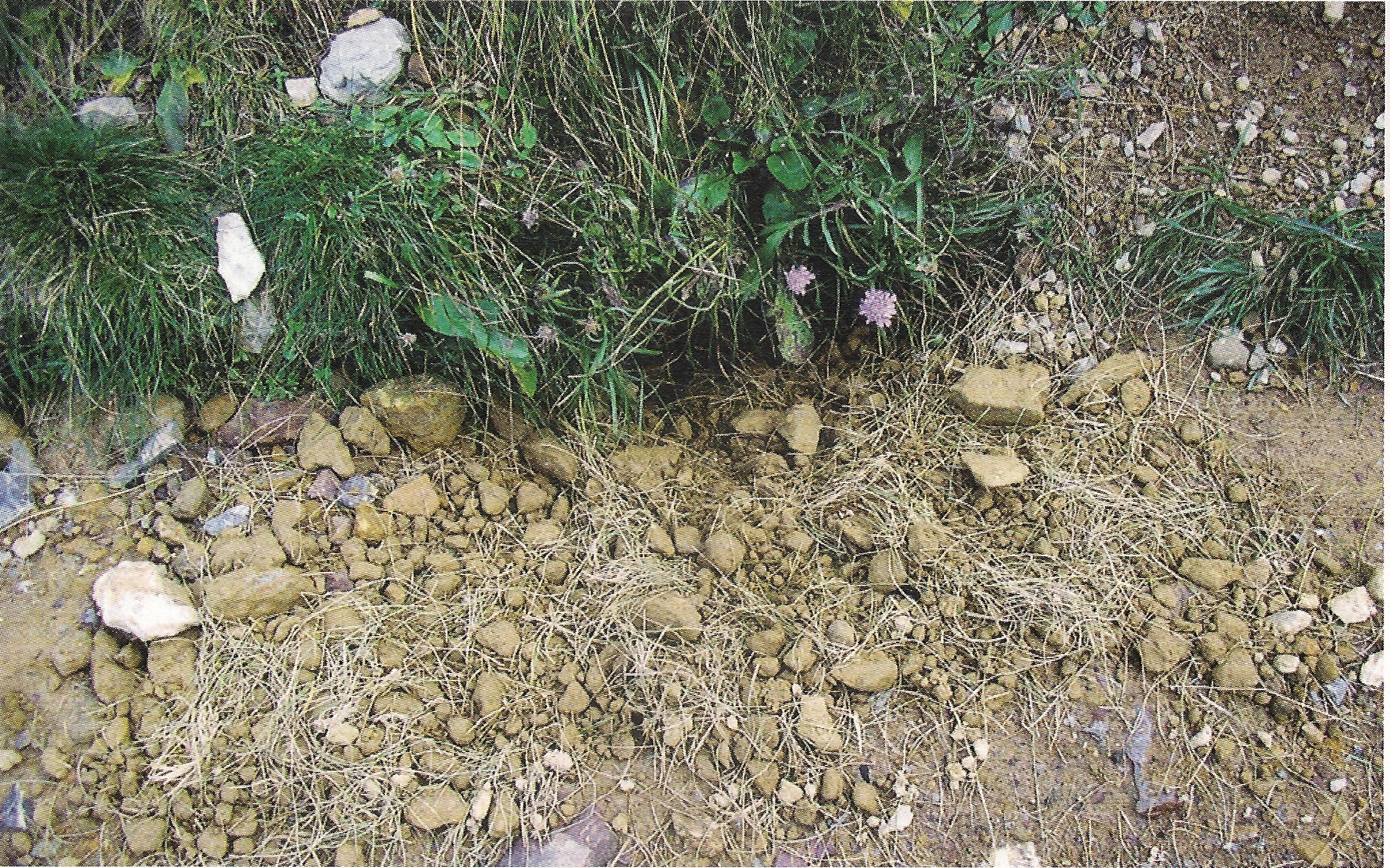 Tzw. zabitka czyli utwardzone zamknięcie nory świstaka tatrzańskiego